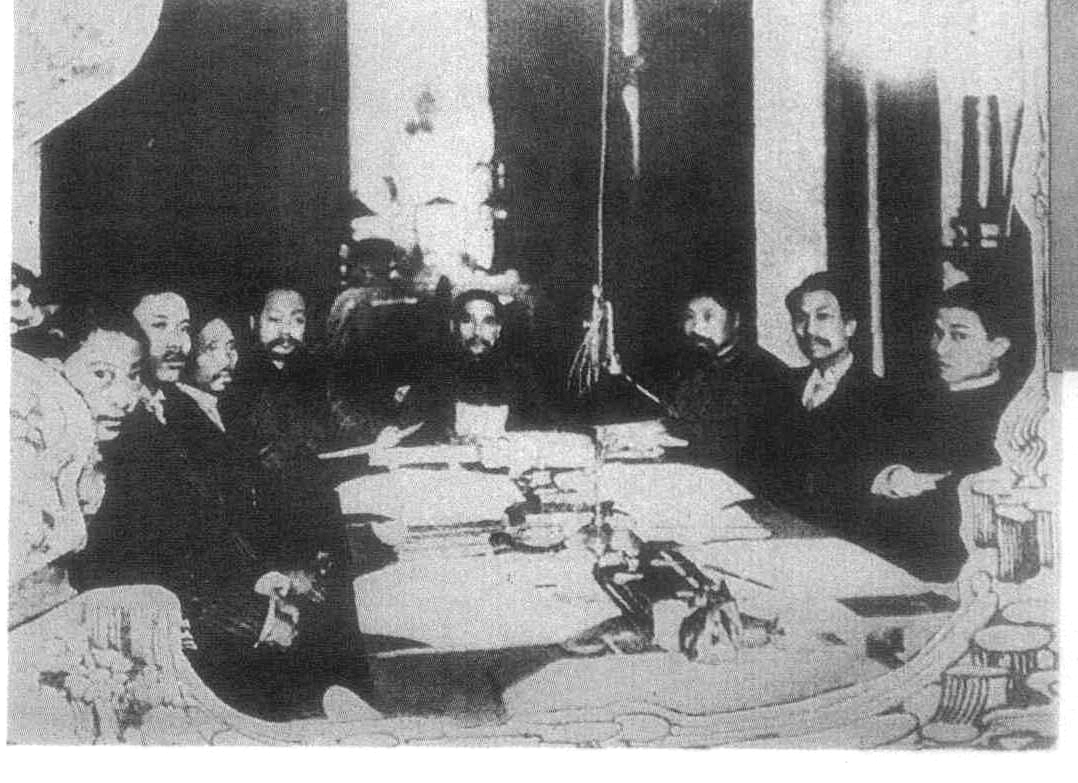 1912年1月5日，孙中山主持召开第一次国务会议。右起：王鸿猷、王宠惠、黄兴；左起：黄钟瑛、景耀月、蔡元培、陈锦涛